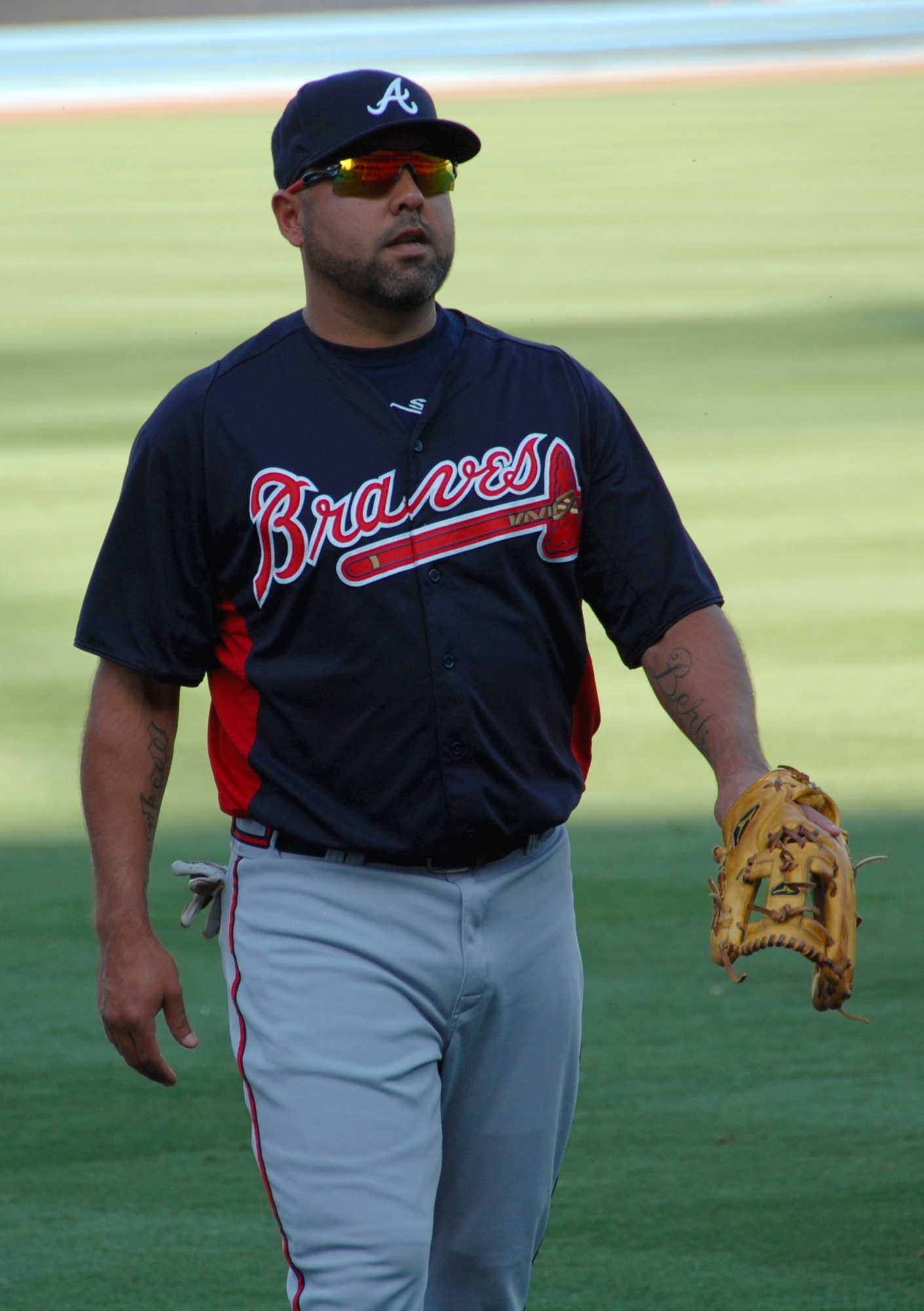 Gerald Laird